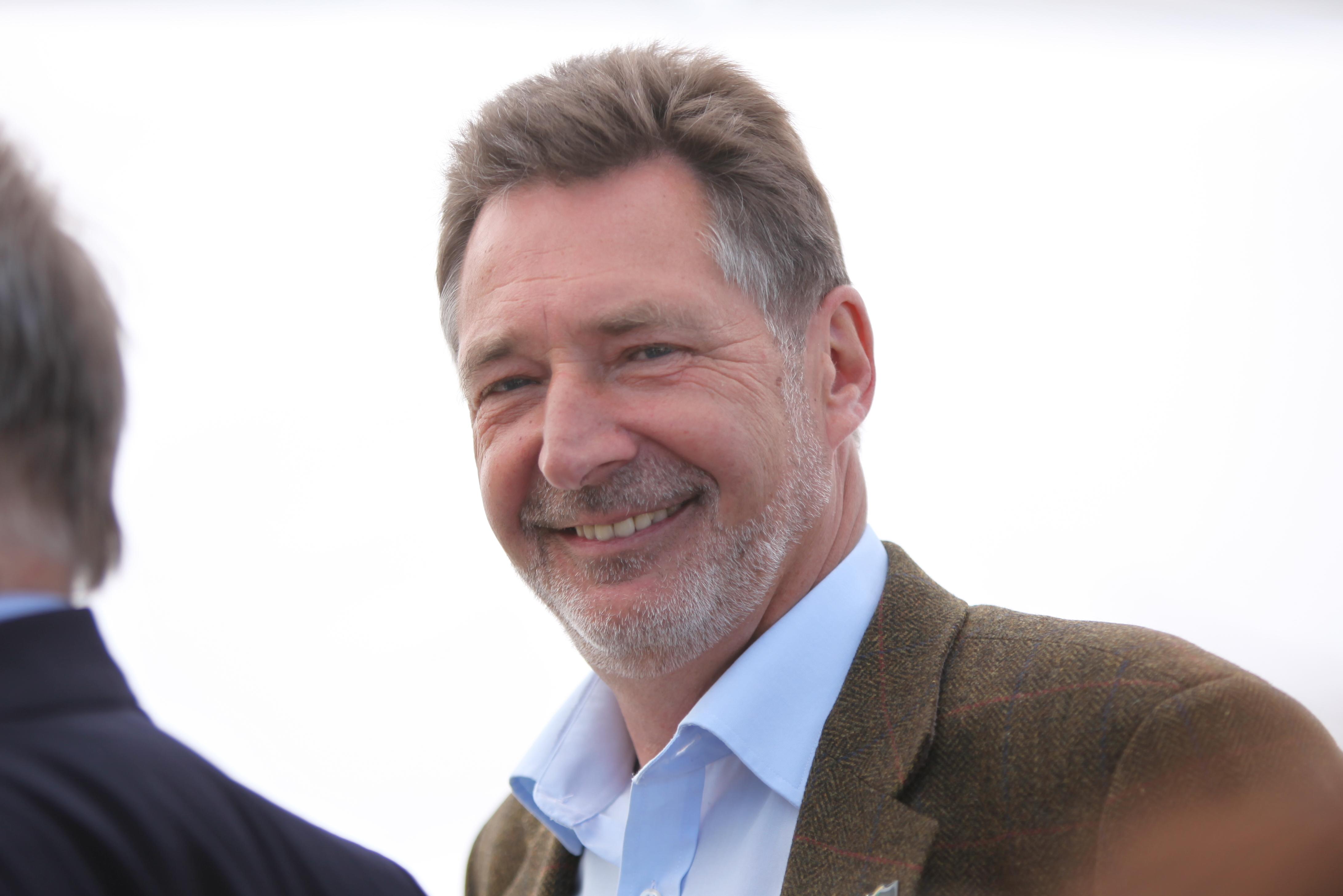 Potsdams Oberbürgermeister Jann Jakobs